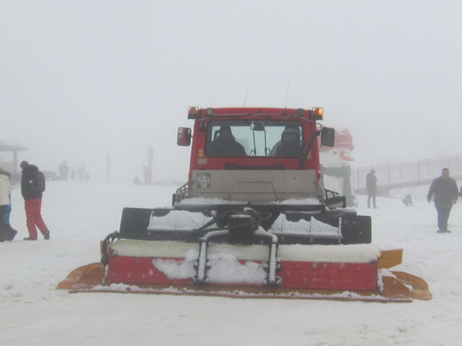 מפלסת שלג בחרמון